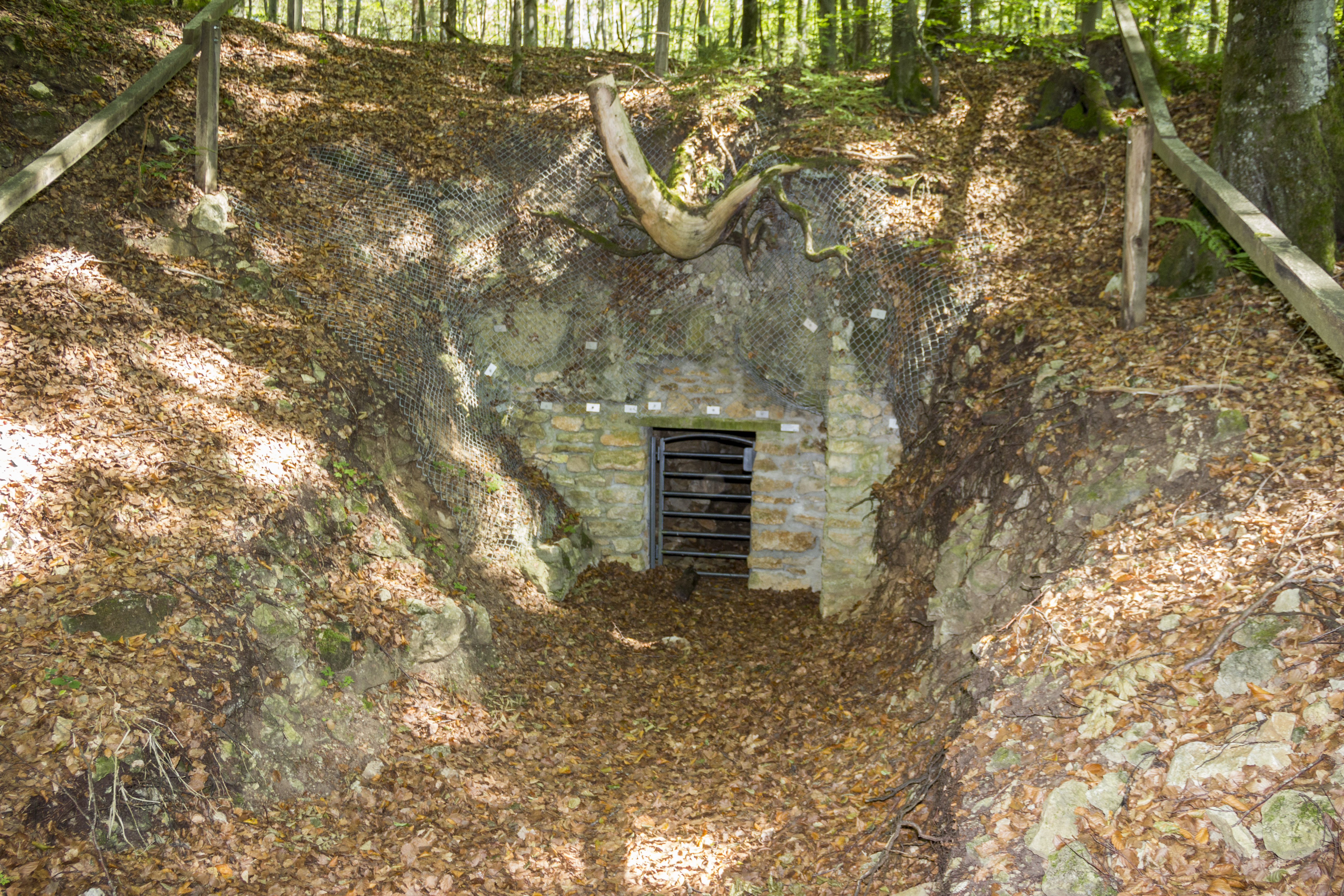 Grubschwart, ehemaliges Bergwerk, Höhle, Stollen, Raitenbucher Forst, Stolleneingang